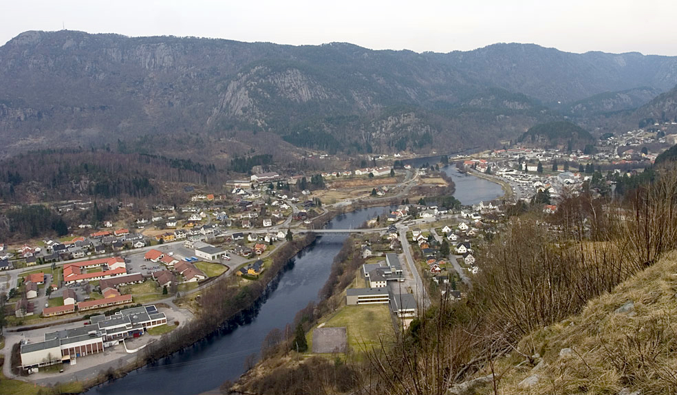 Liknes sentrum i Kvinesdal